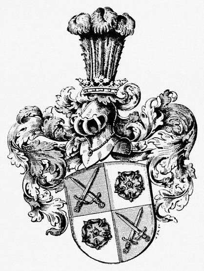 Wappen der Familie von Freydorf (morganatische Seitenlinie des Hauses Baden-Durlach)